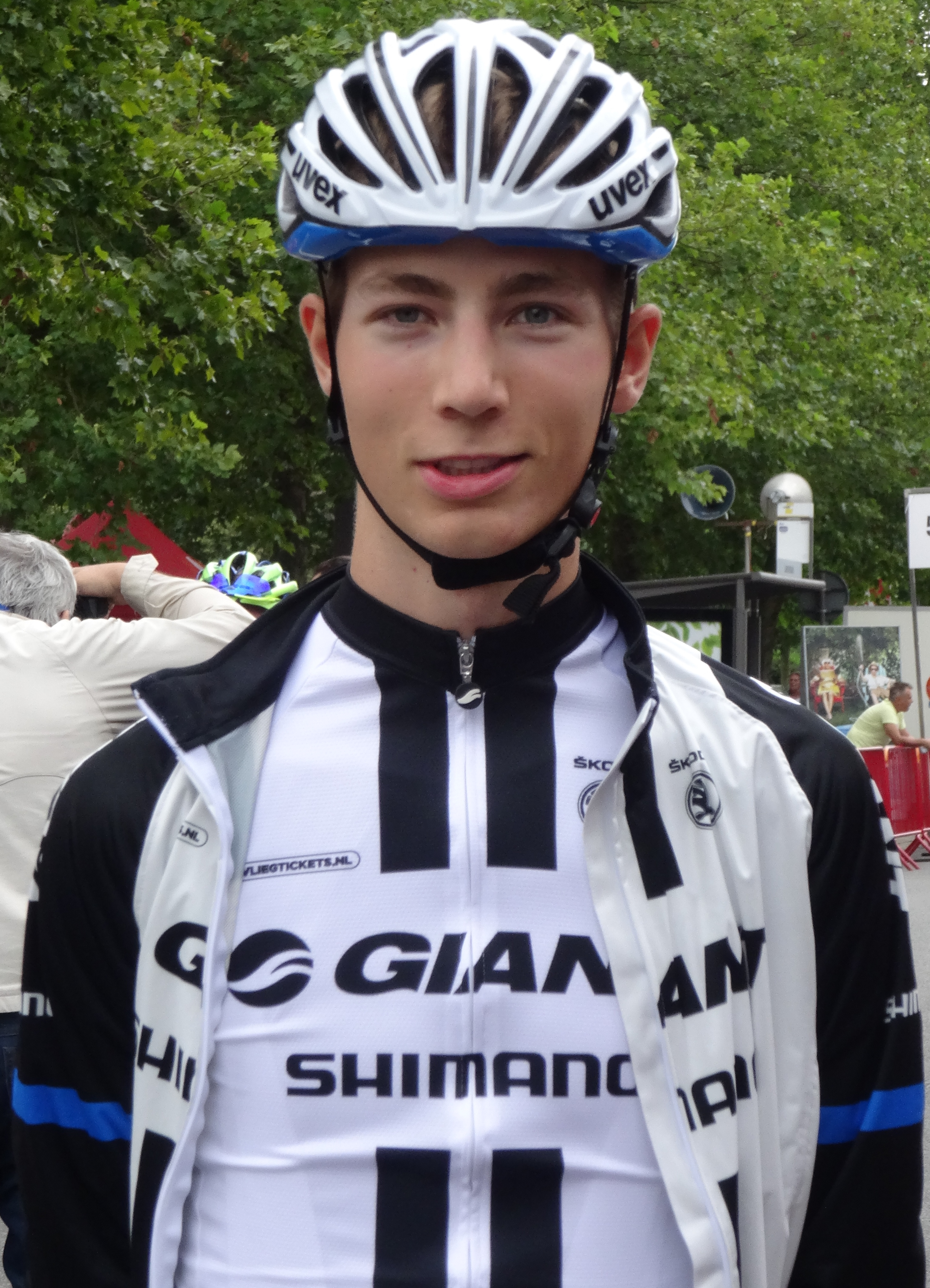 Reportage photographique réalisé le dimanche 10 août à l'occasion du départ et de l'arrivée de la Flèche du port d'Anvers 2014 à Merksem (Anvers), Belgique.